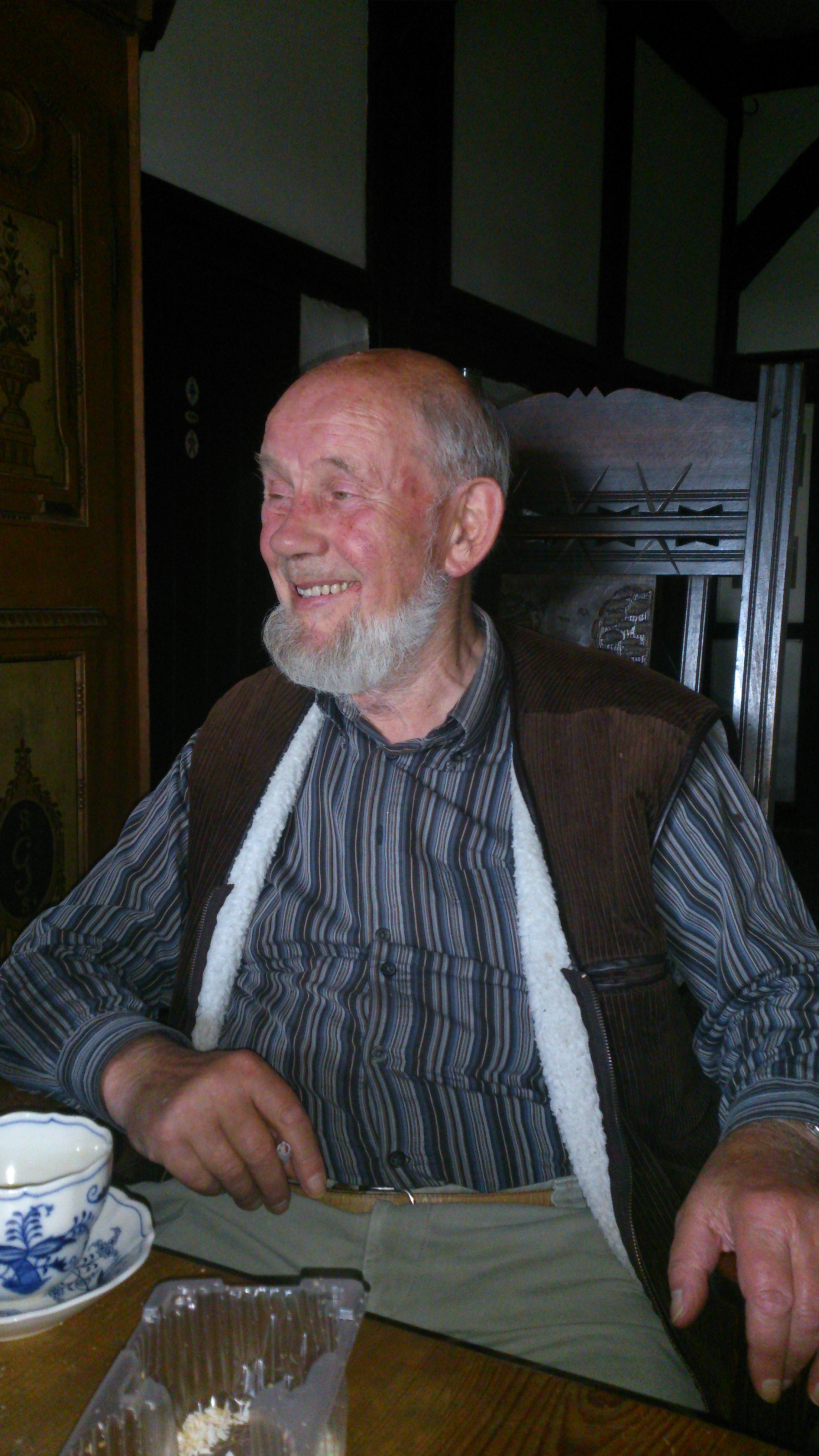 Rolf Möller in seinem Haus in Wodorf bei Wismar am 23. August 2013